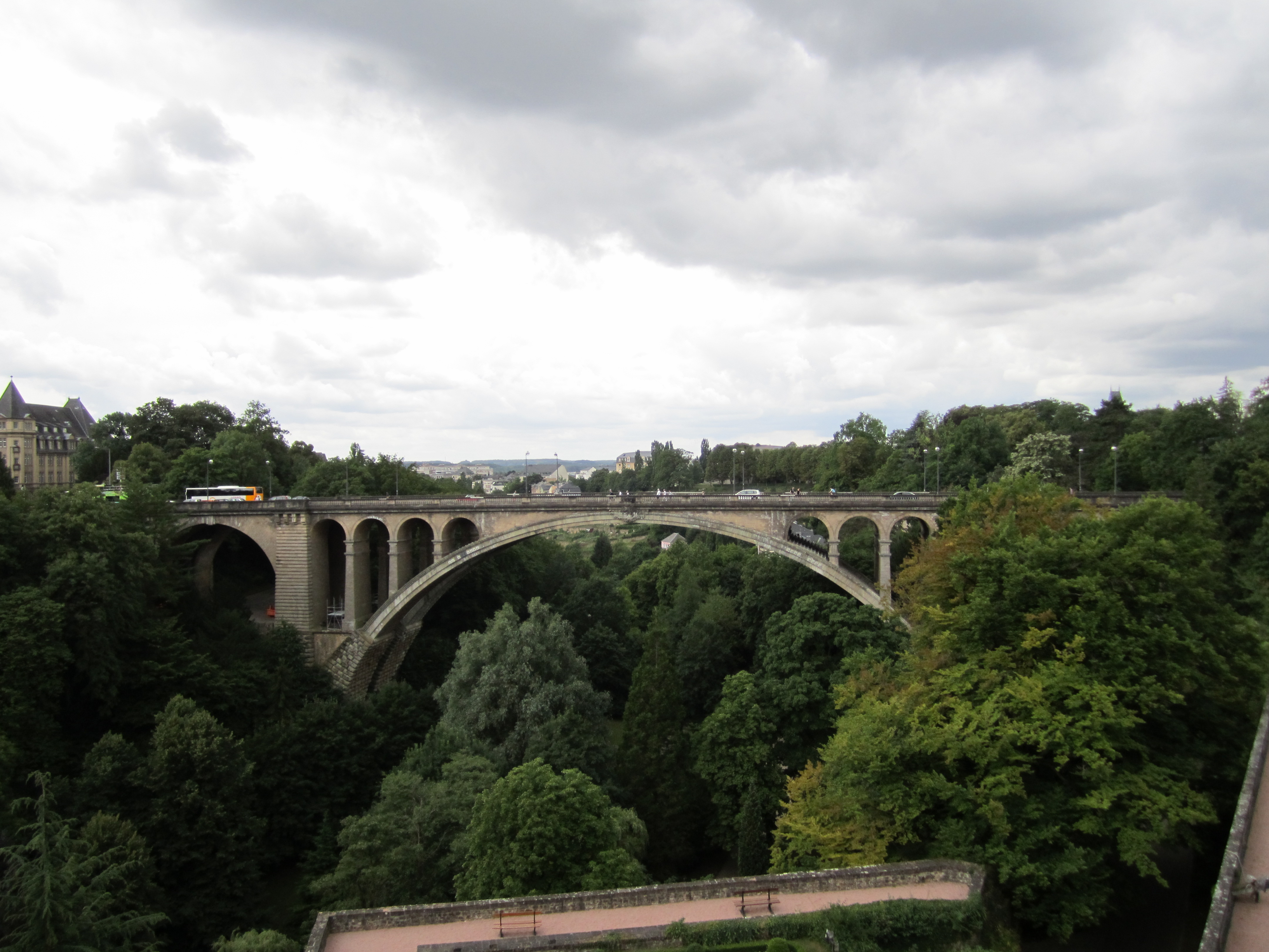 Bru i Luxembourg.